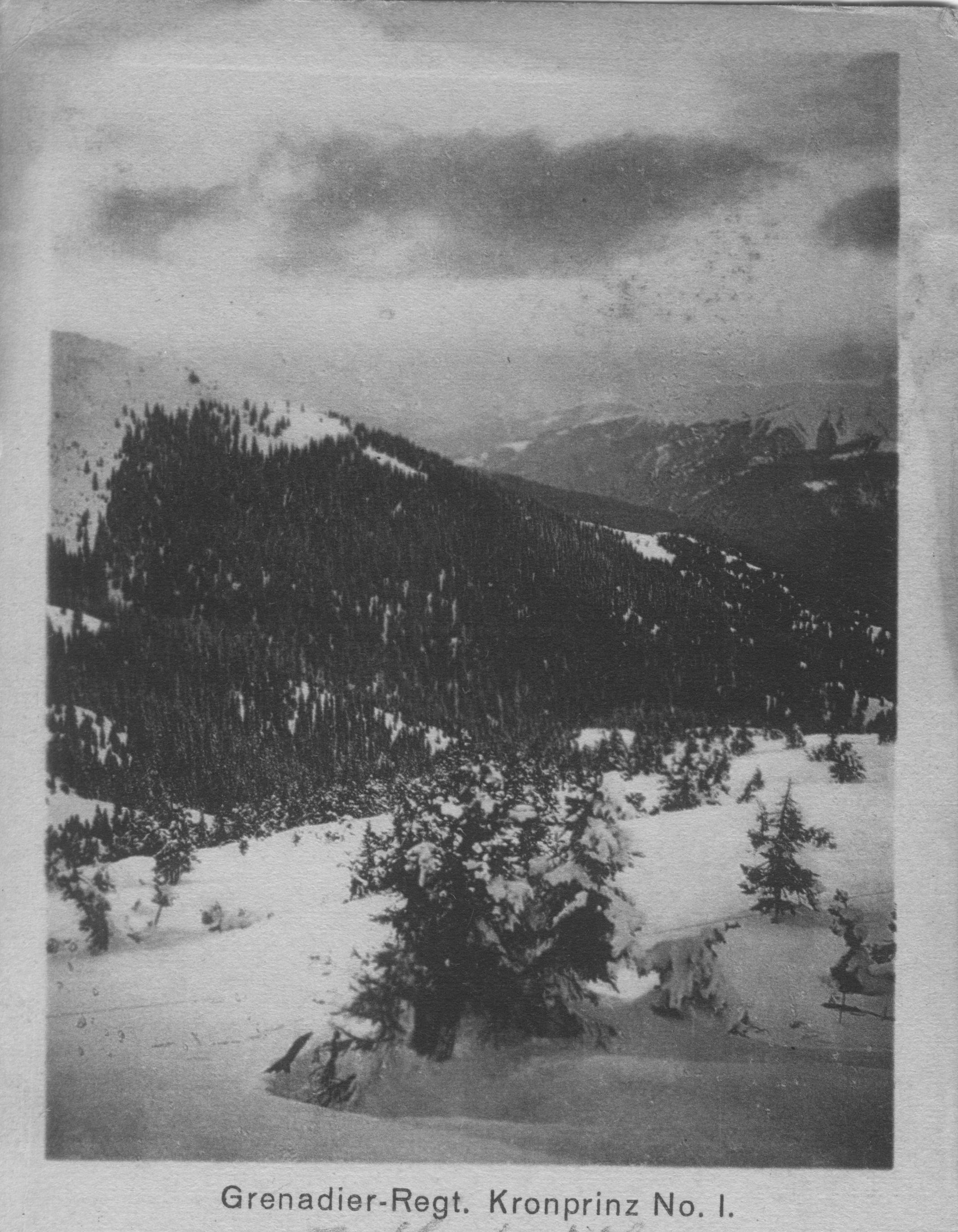 Der Zwinin vom Ostrawa-Tal